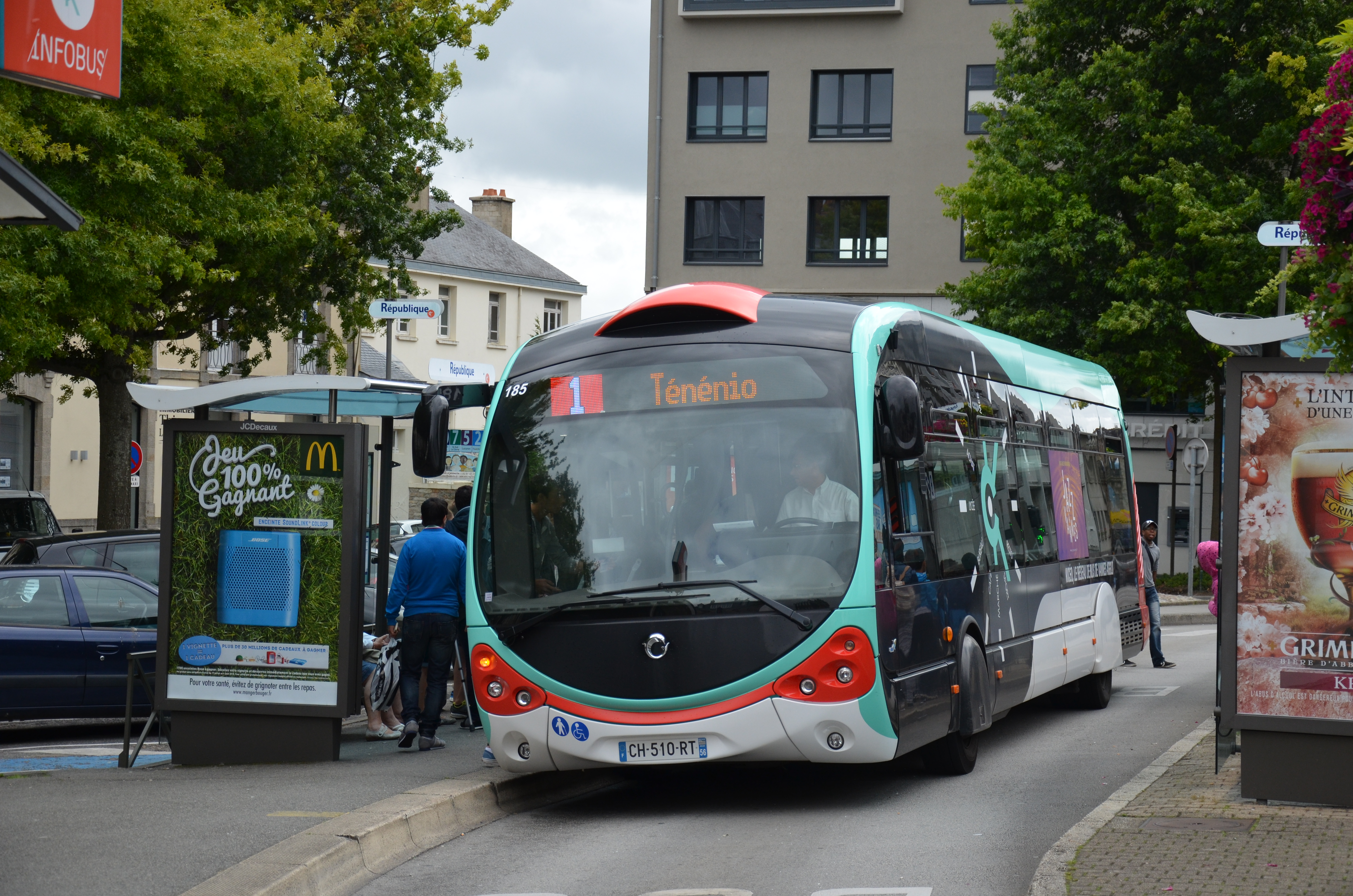 Irisbus Crealis 12 n°185 à l'arrêt République, sur le réseau Kicéo de Vannes.